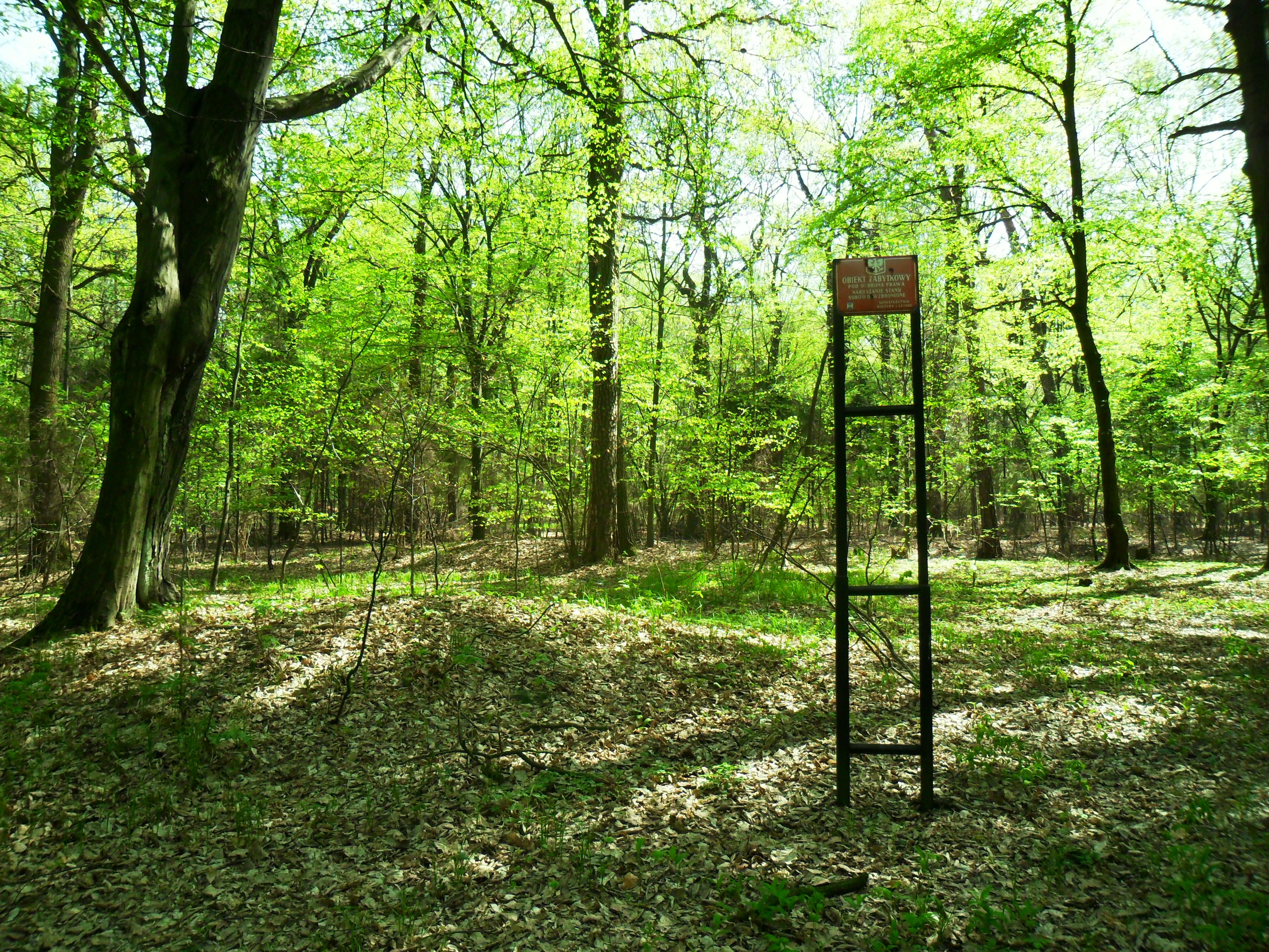 Wczesnośredniowieczne stanowisko kurhanowe w lesie Obora, w Raciborzu.